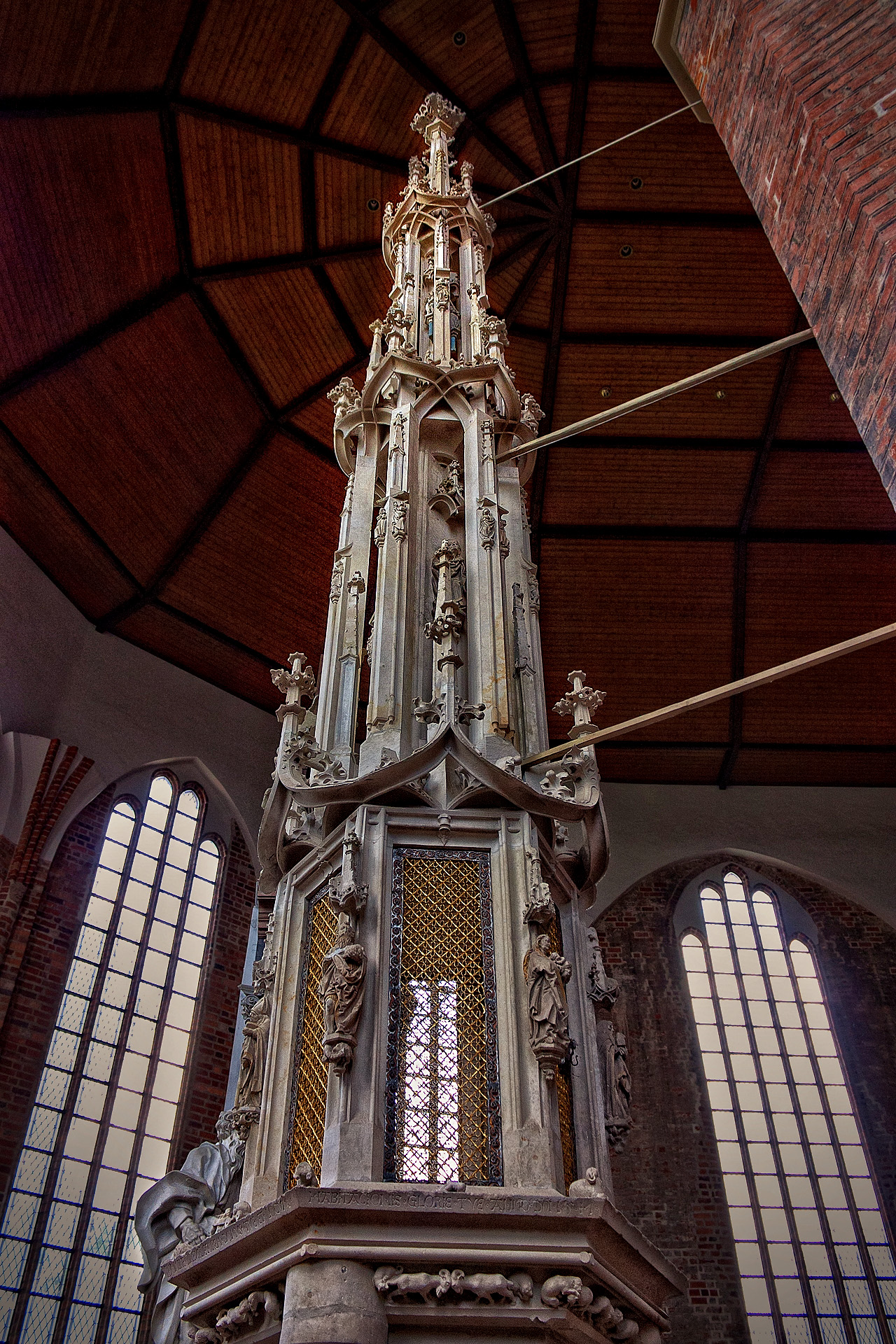 St. Marien Dom , Domstadt Fürstenwalde/Spree